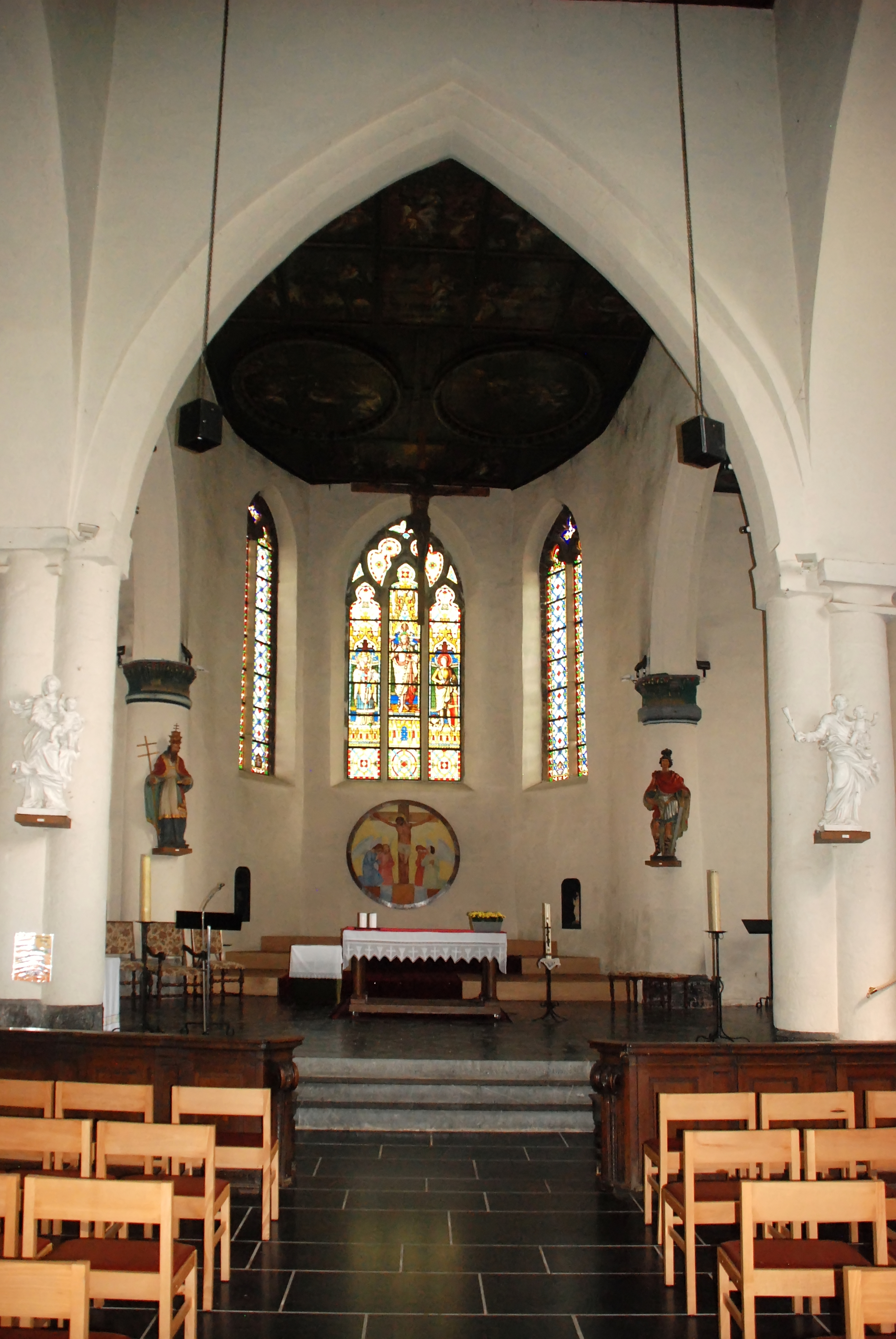 Belgique - Wallonie - Église Saints-Hermès-et-Alexandre de Theux